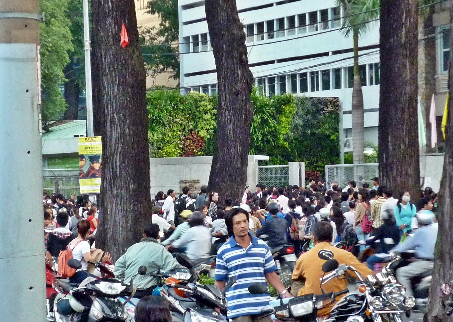 Phụ huynh và học sinh tại kỳ thi tuyển vào Đại học Kiến trúc TPHCM năm 2012.